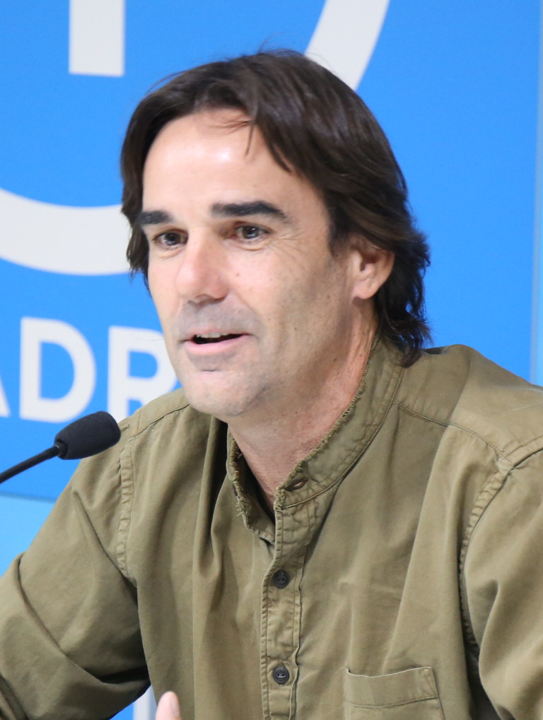 Aula de Formación continua con Cake Minuesa